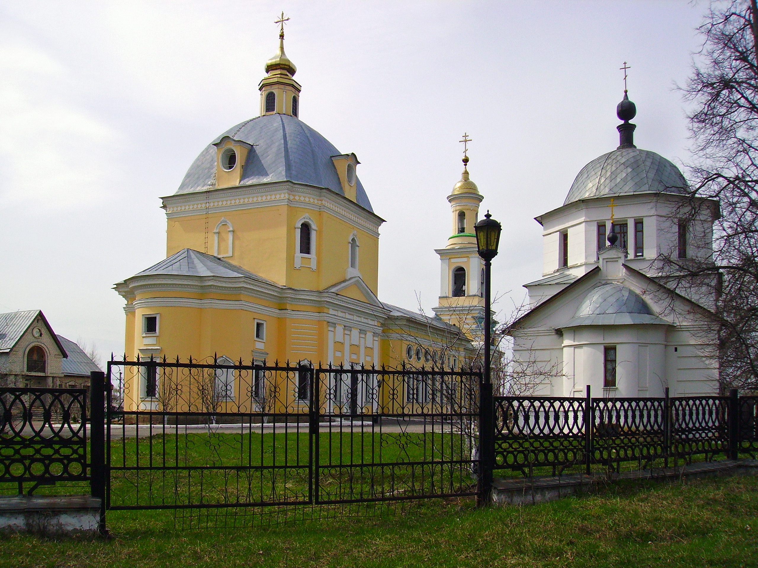 Выкса. Храмовый комплекс на Советской площади